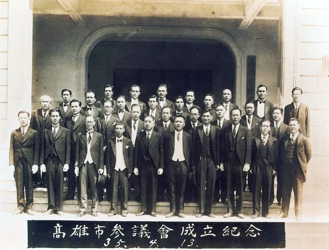 中文（台灣）: 1946年（中華民國35年）4月13日，高雄市參議會成立紀念照，議長彭清靠，副議長林建論。任期原定1946年至1948年，後奉令延至1951年。議員人數31人。